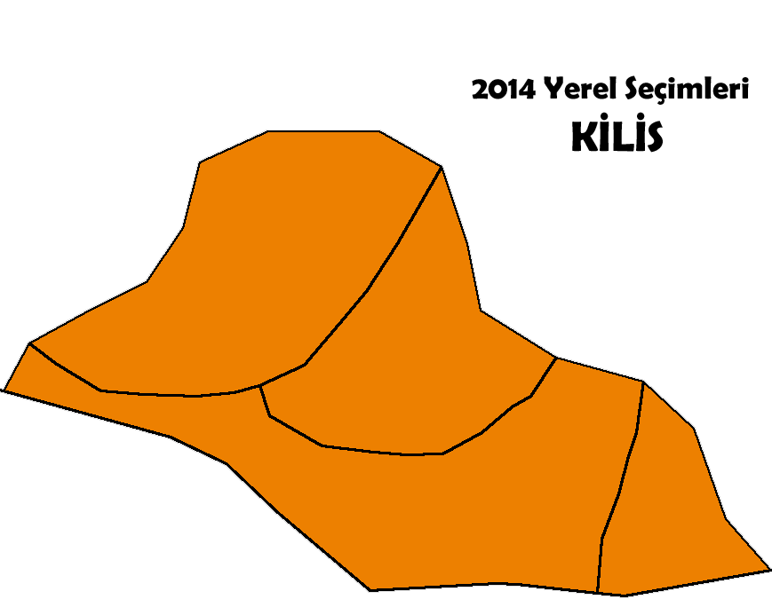 2014 Türkiye yerel seçimleri